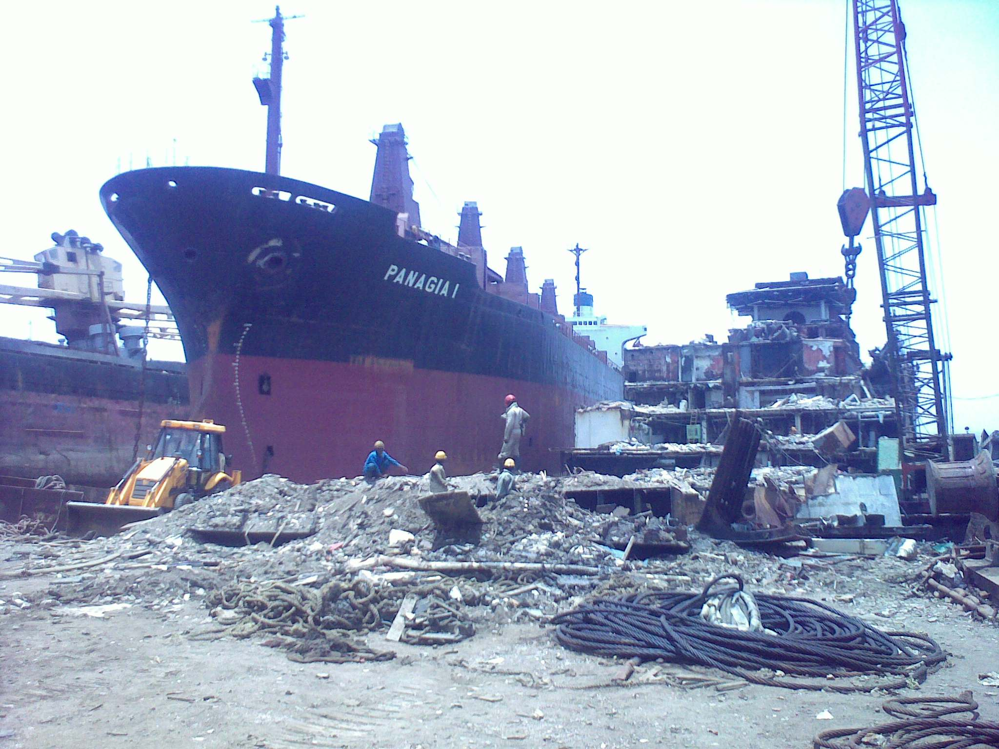 Alang Ship Breaking